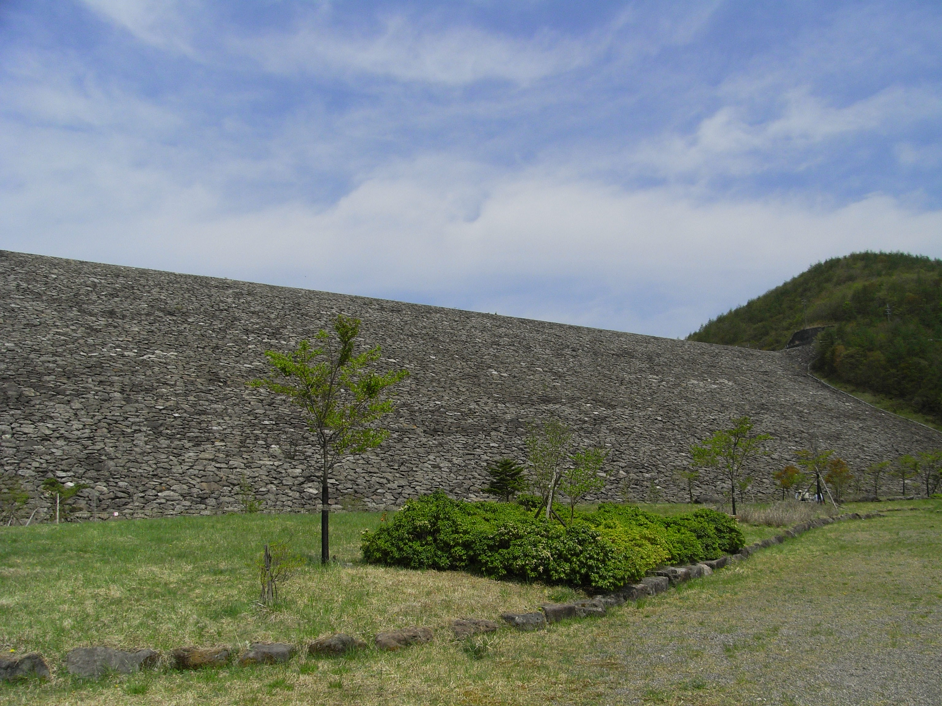 Dam